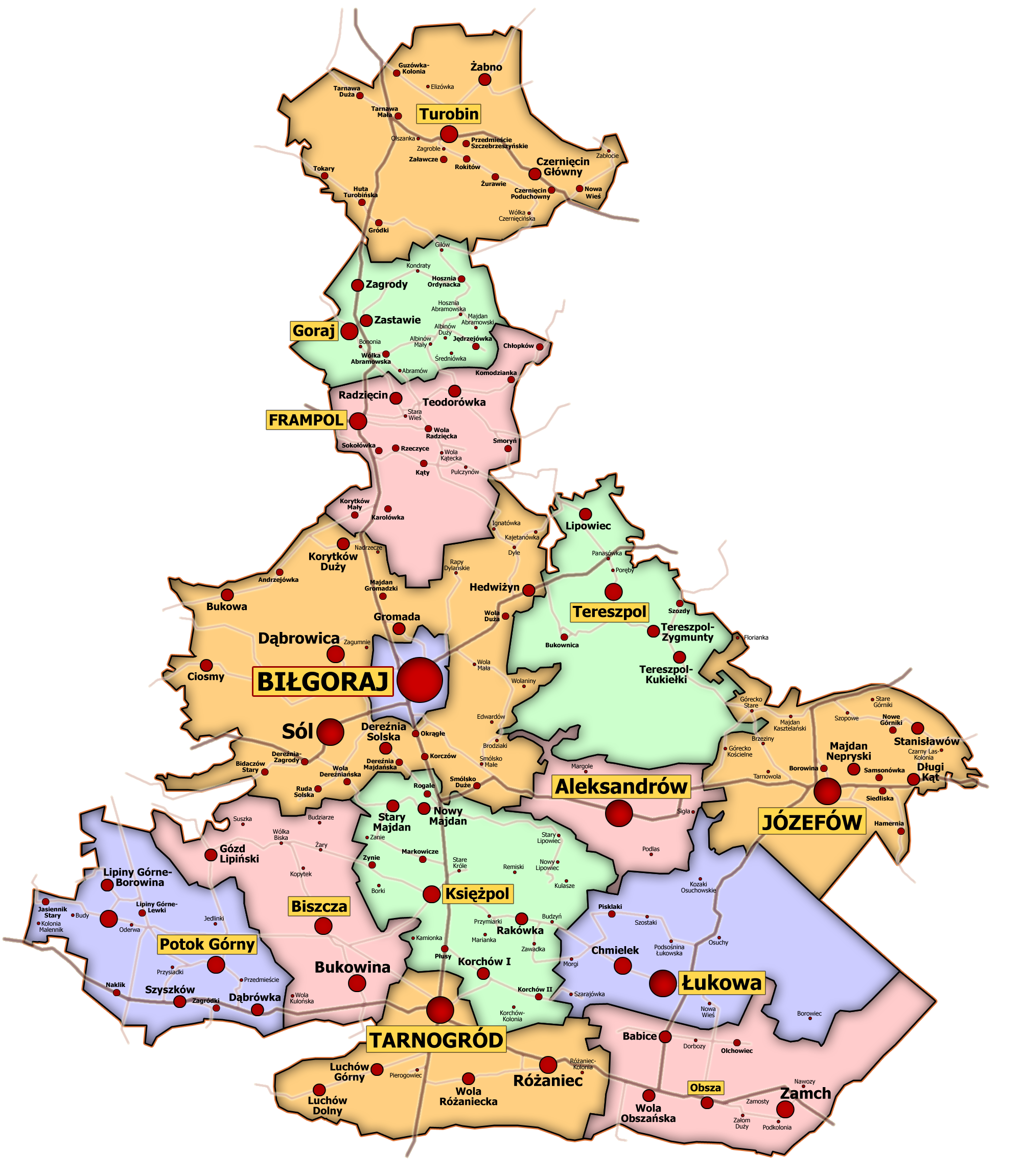 Mapa powiatu biłgorajskiego • Detailed map of Biłgoraj County (powiat), Poland